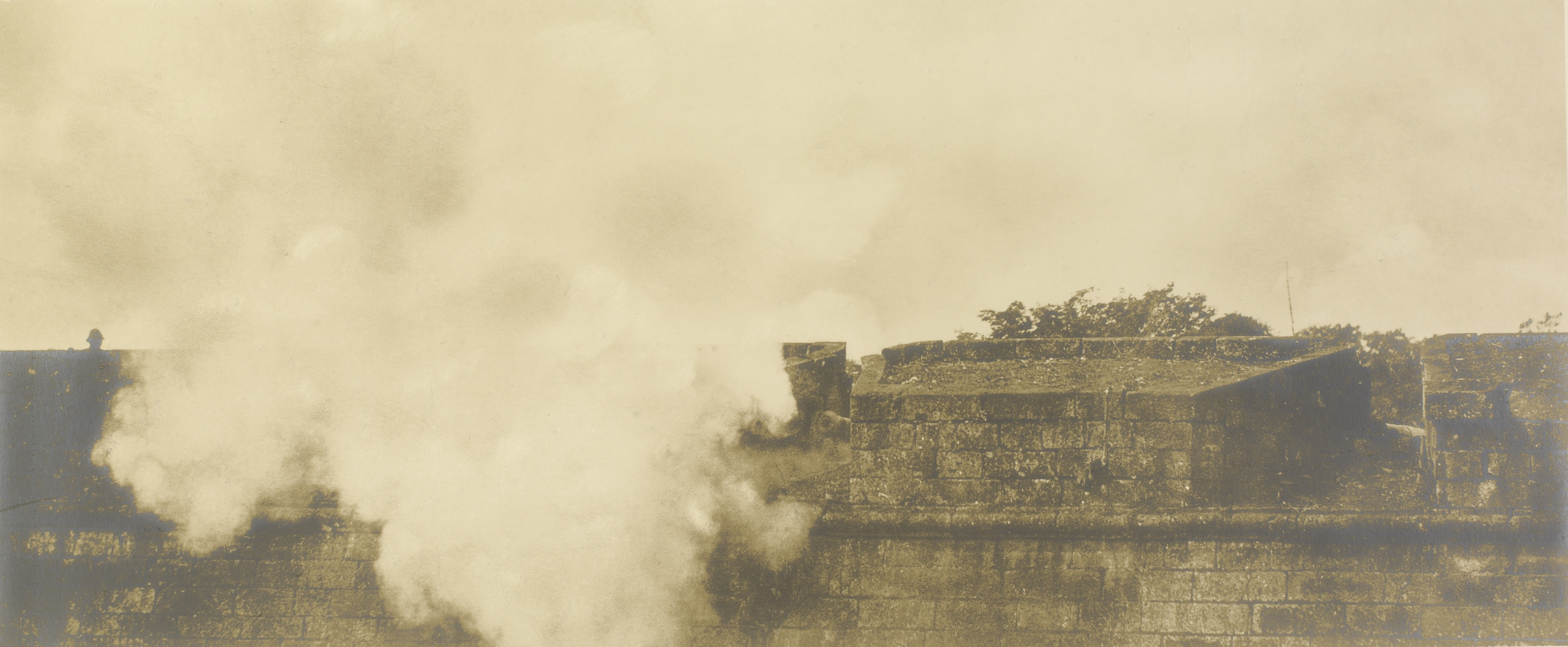 Imagem do Fundo Ministério da Guerra, do Arquivo Nacional